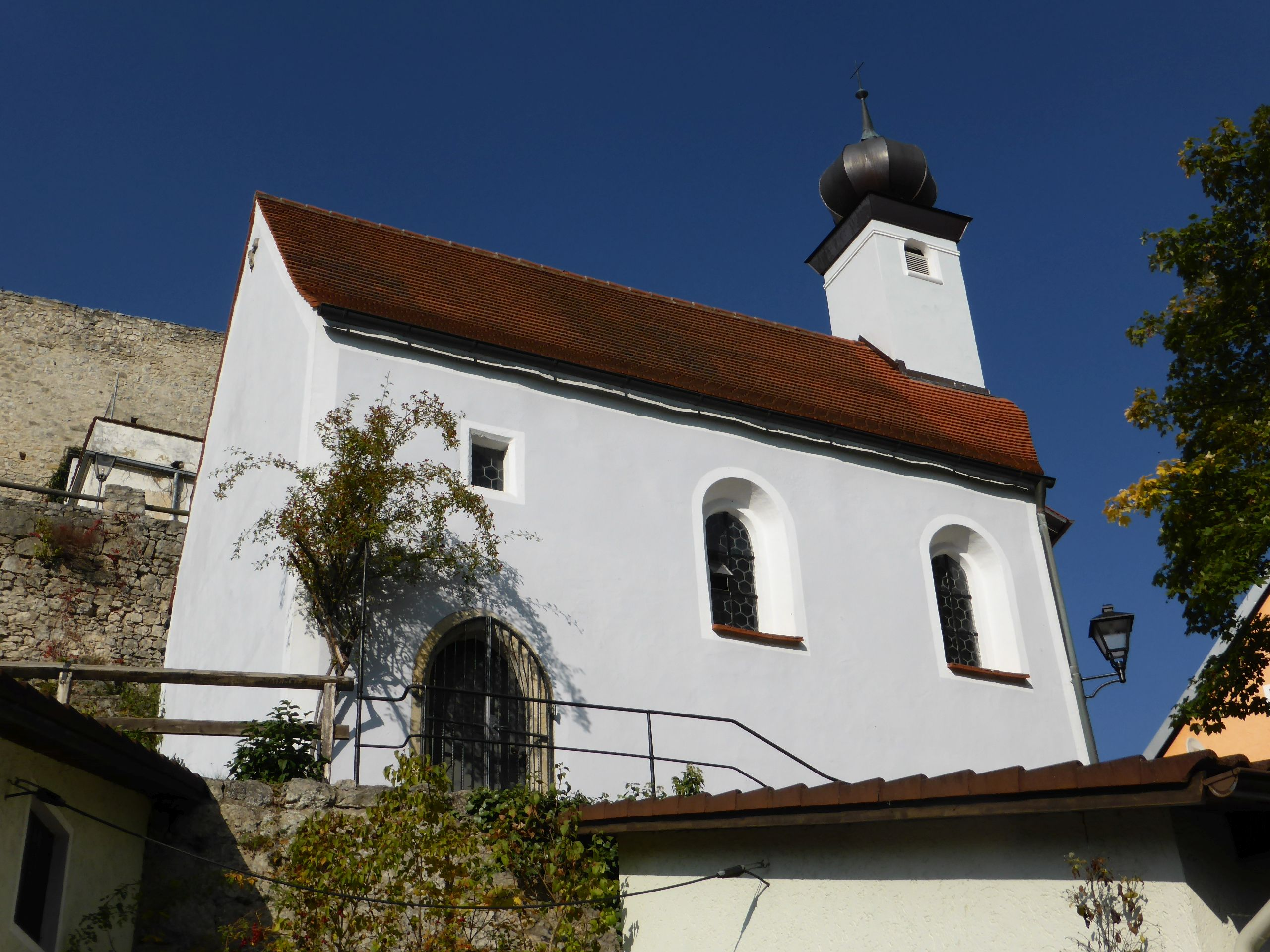 Wolfsegg (Hohenwarth)